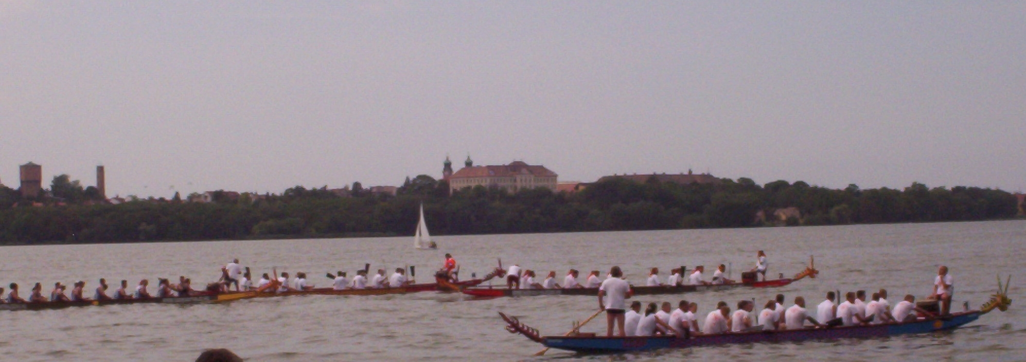 Sárkányhajó-verseny a tatai Öreg-tavon